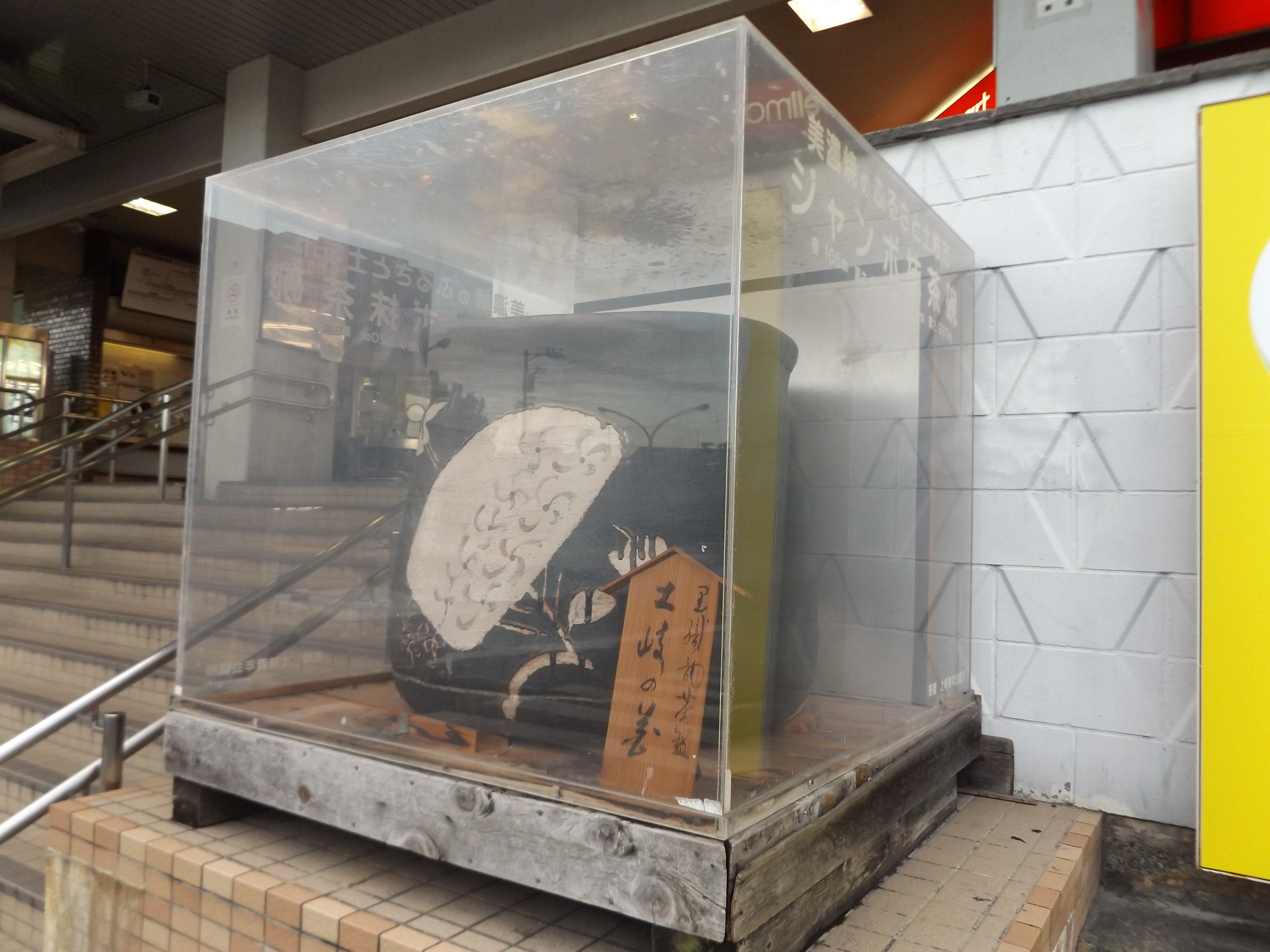 岐阜県土岐市の東海旅客鉄道（JR東海）中央本線（中央西線）土岐市駅前にある巨大な抹茶碗。